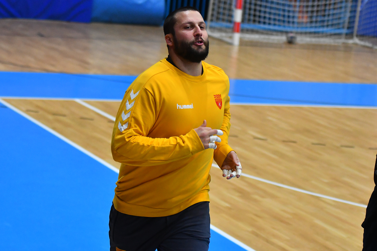 Trening na Makedonija 14.01.2018